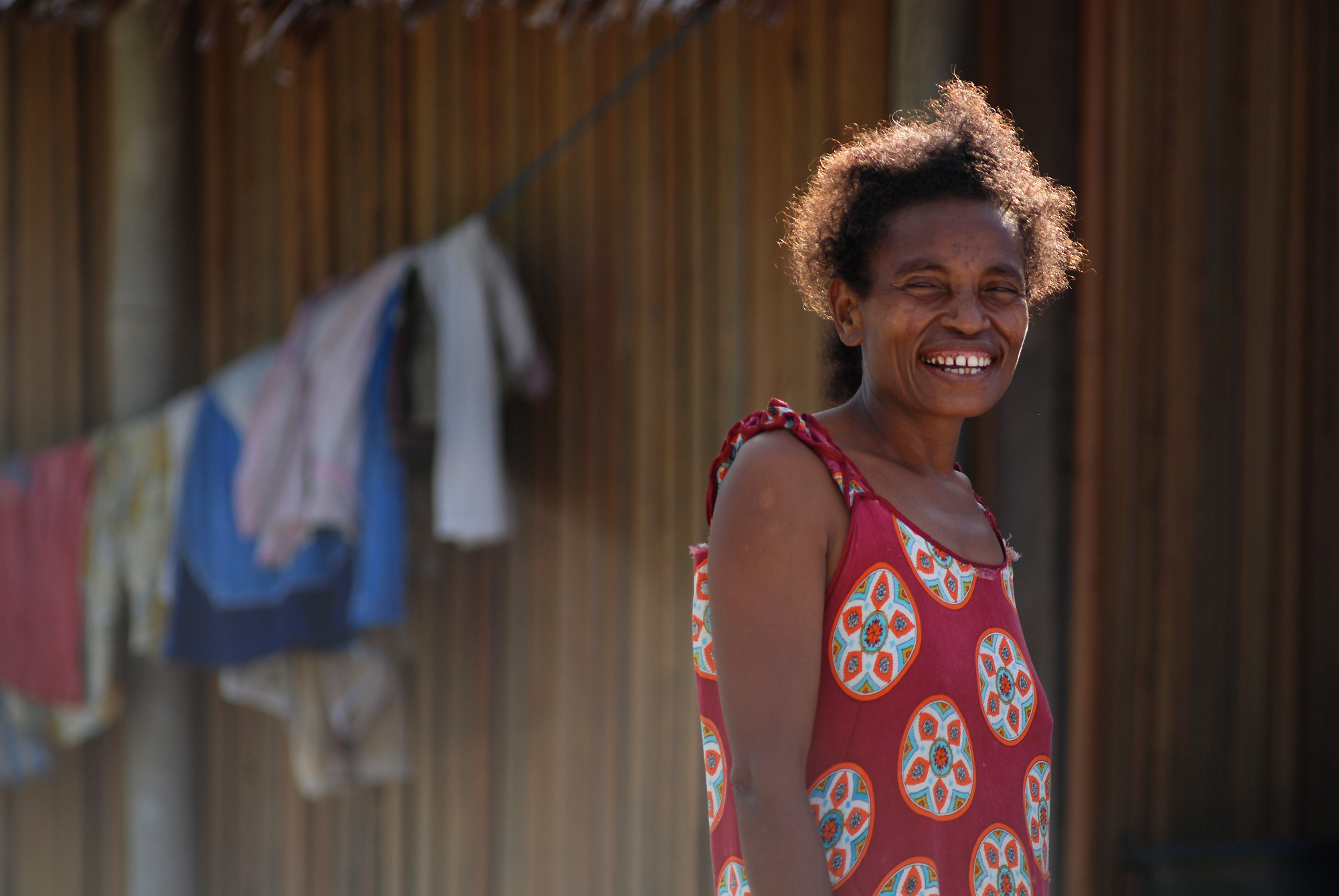 Suku Biak